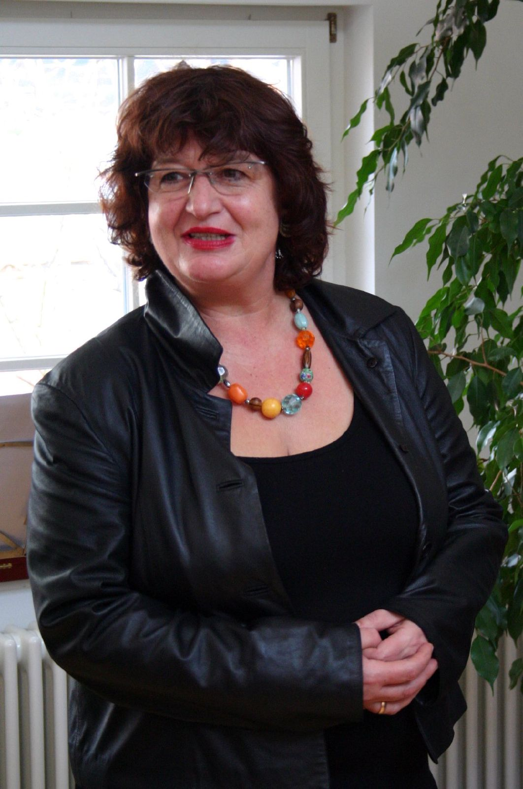 Bärbl Mielich, MdL Part of Neujahrsempfang 2007